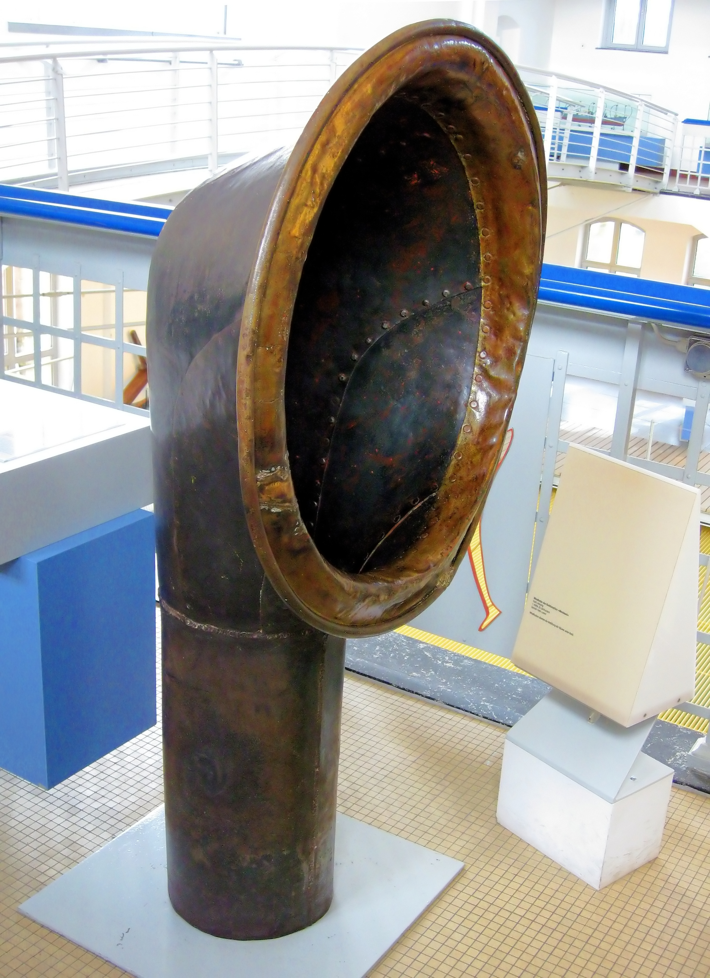 Windhutze des ehemaligen Raddampfers "Westmark", 1.Hälfte 20.Jahrhundert (Stahl, Messing), Ausstellungsobjekt im Museum der Deutschen Binnenschifffahrt in Duisburg (Spende Gebr. Luwen)